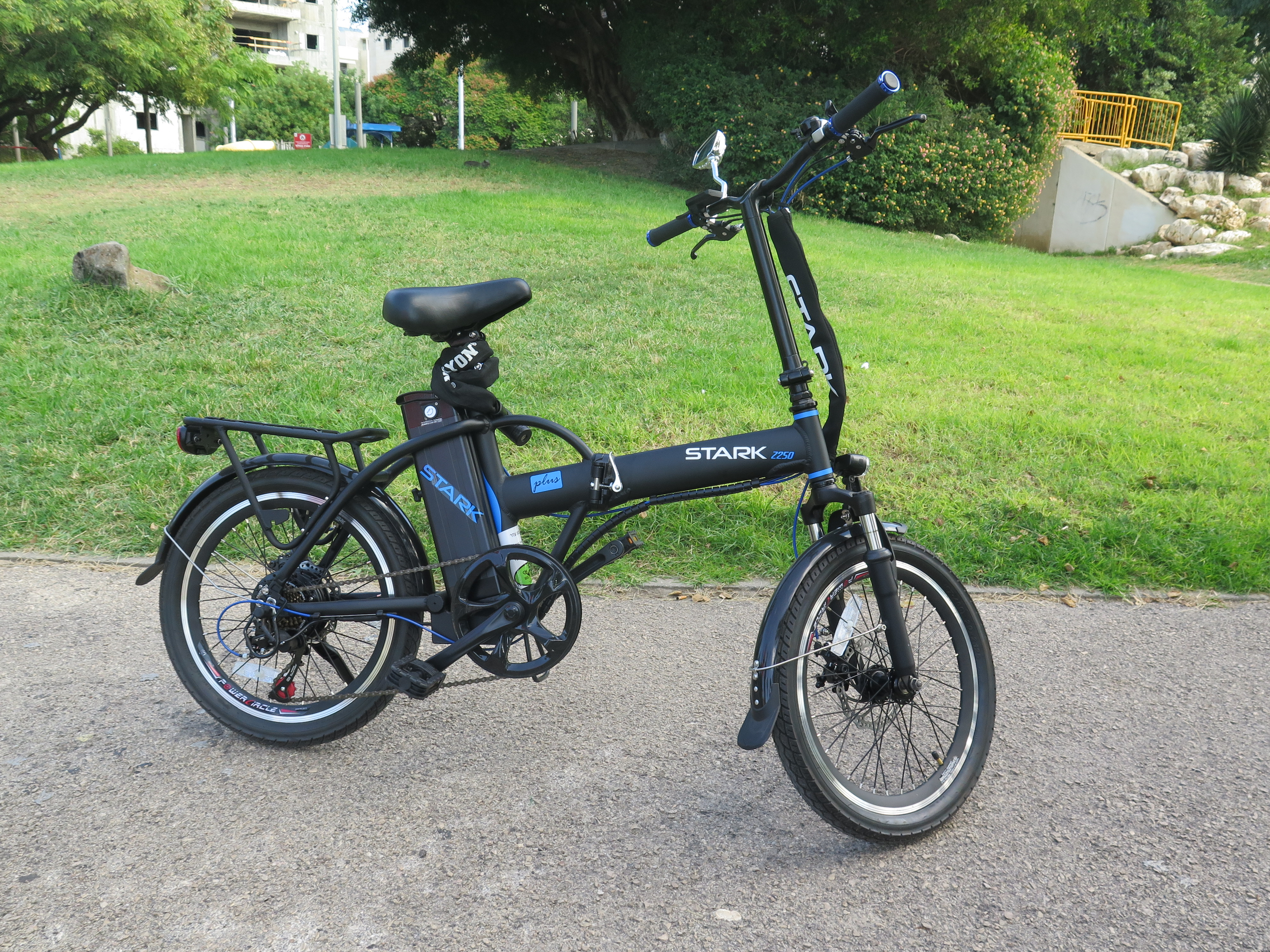 אופניים חשמליים